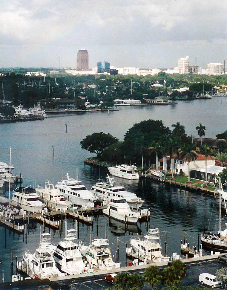 Hafe vu Fort Lauderdale.